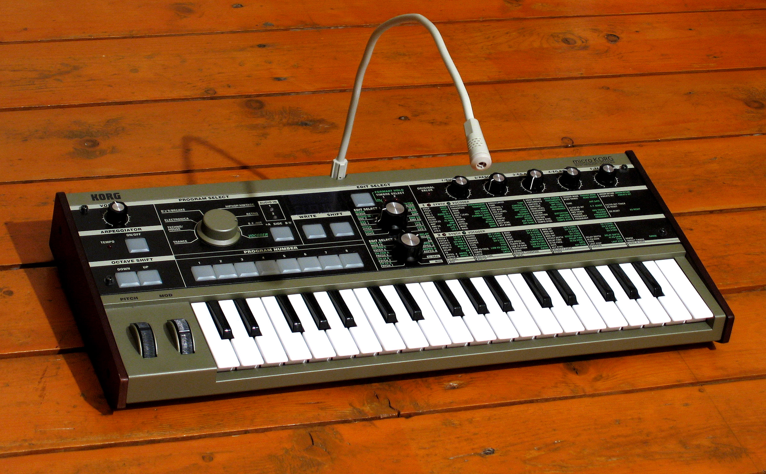 Micro Korg synthesizer/vocoder